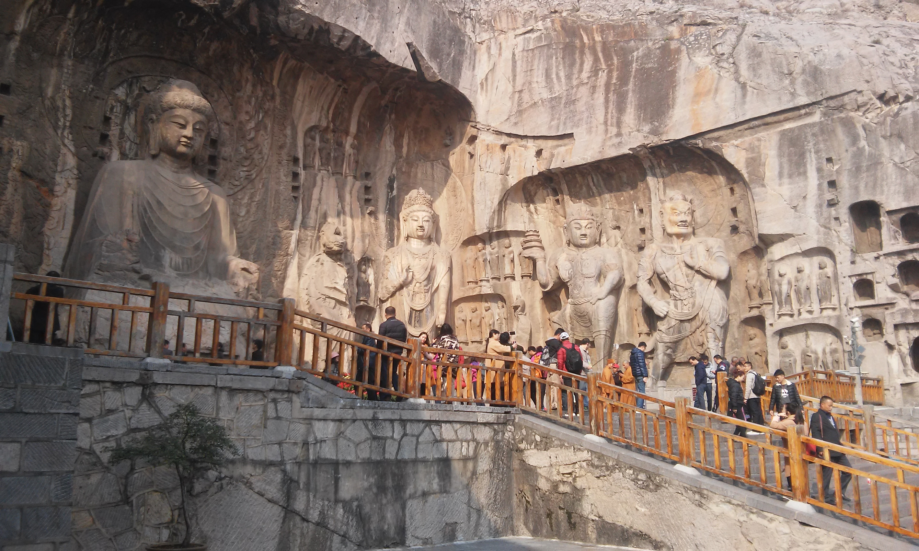 grotoes de luoyang , proximo a estacao de trem de longmen grottoes